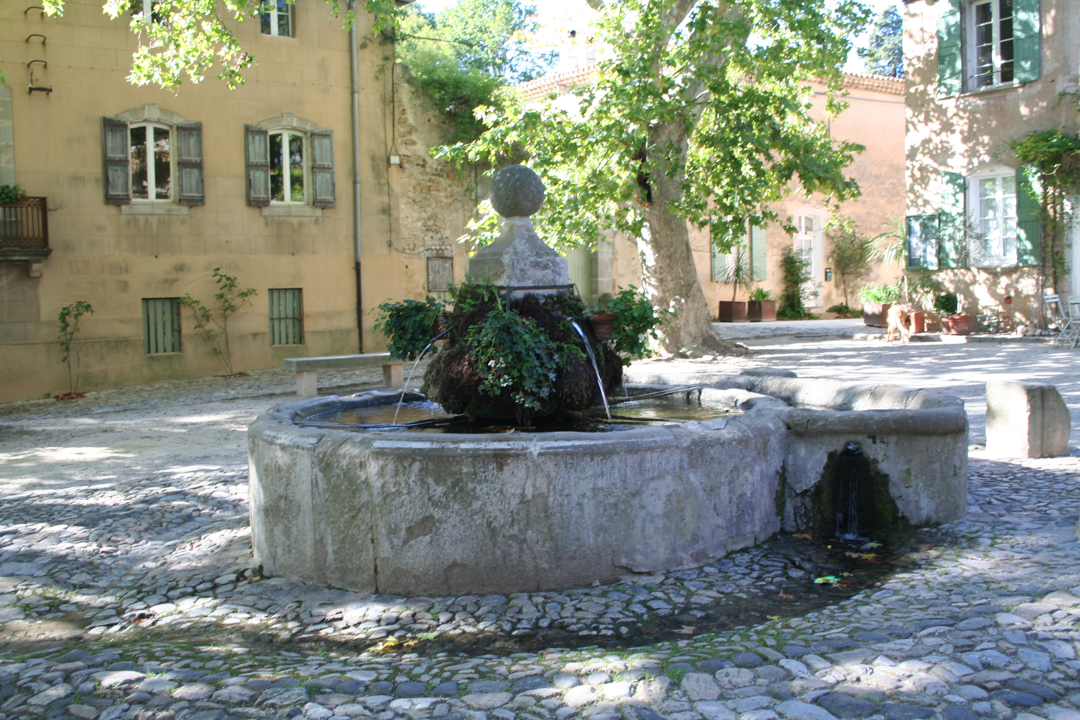 Fontaine à Villeneuvette (Hérault).